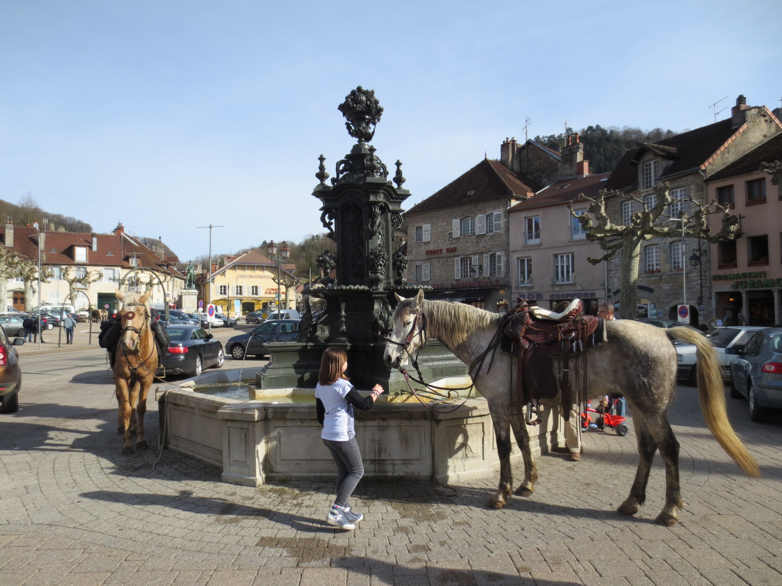 Place des déportés de Poligny